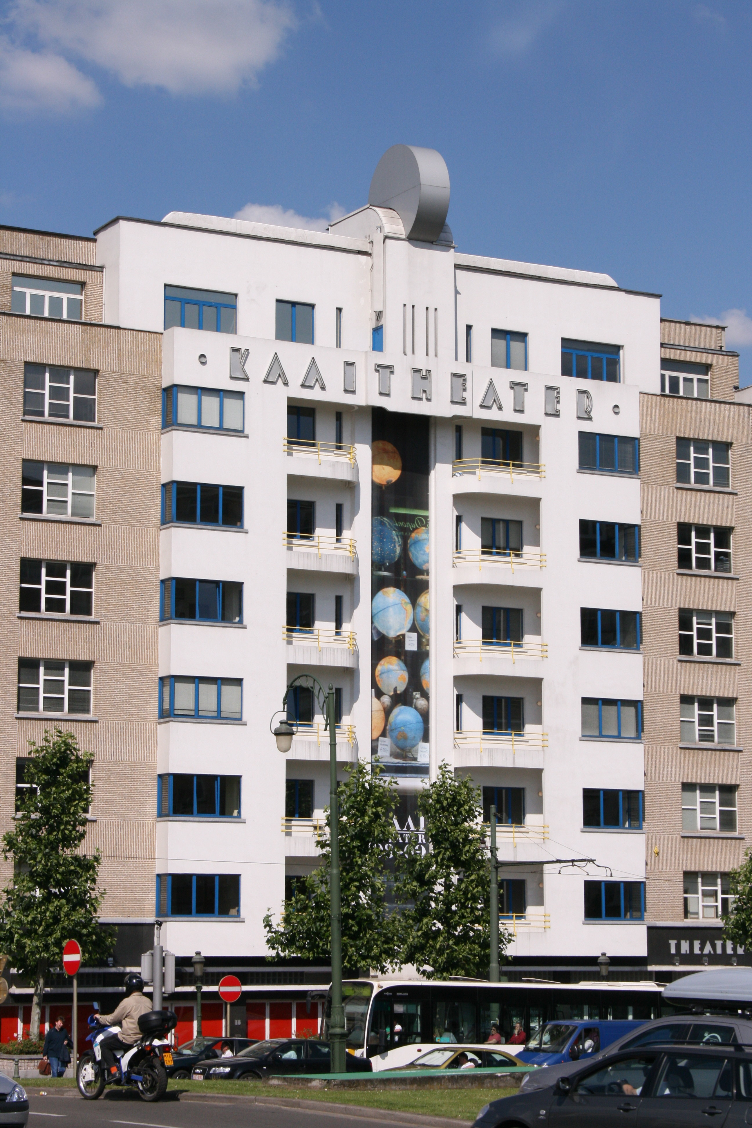 "Kaaitheater" : Immeuble La Luna, Place Sainctelette 20 et Quai des Péniches 4, Architecte: Marcel Driesman, construction: 1929-1932